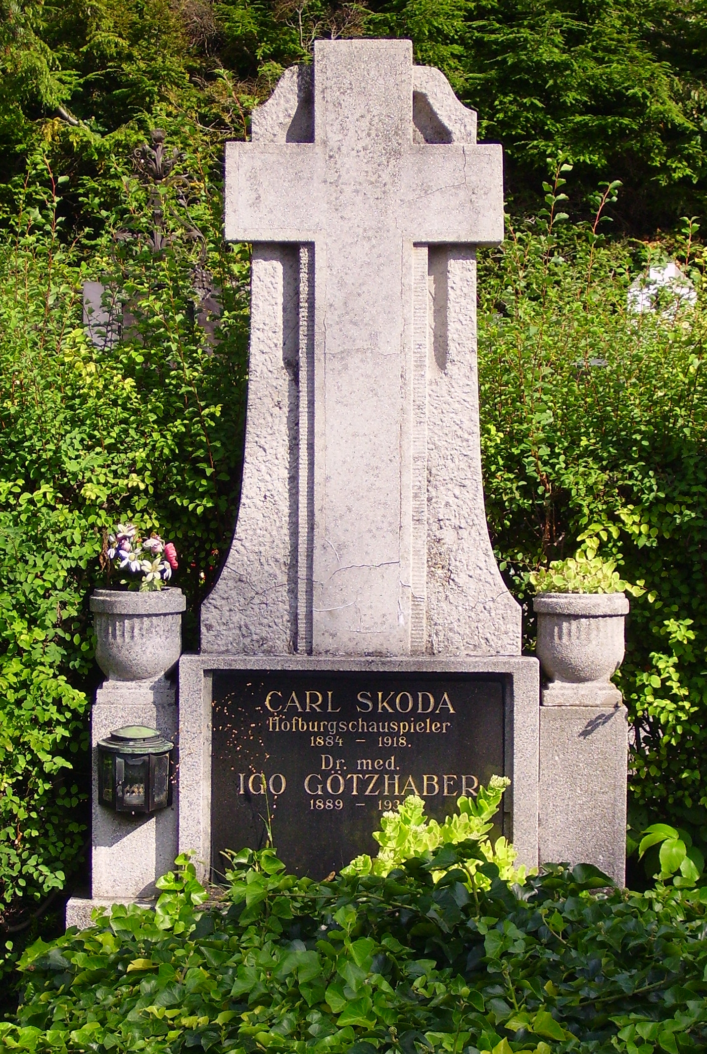 Carl Skoda, Hofburgschauspieler, grave at Döblinger Friedhof, Vienna